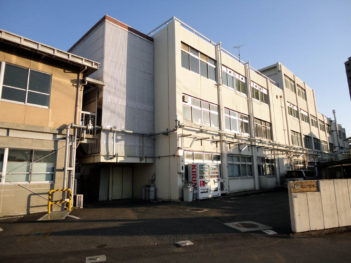 JR西日本 岡山気動車区